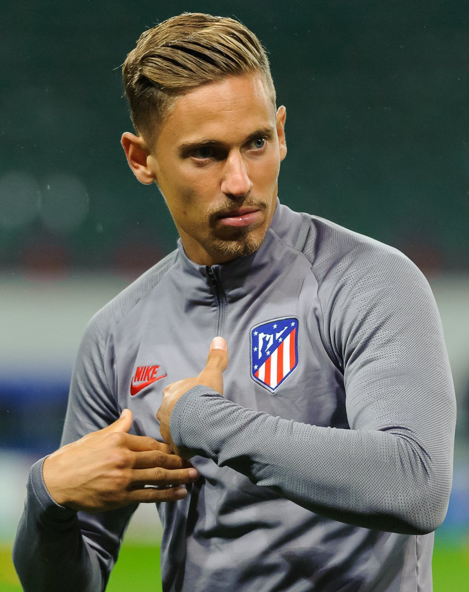 «Атлетико» готовится к матчу с «Локомотивом»